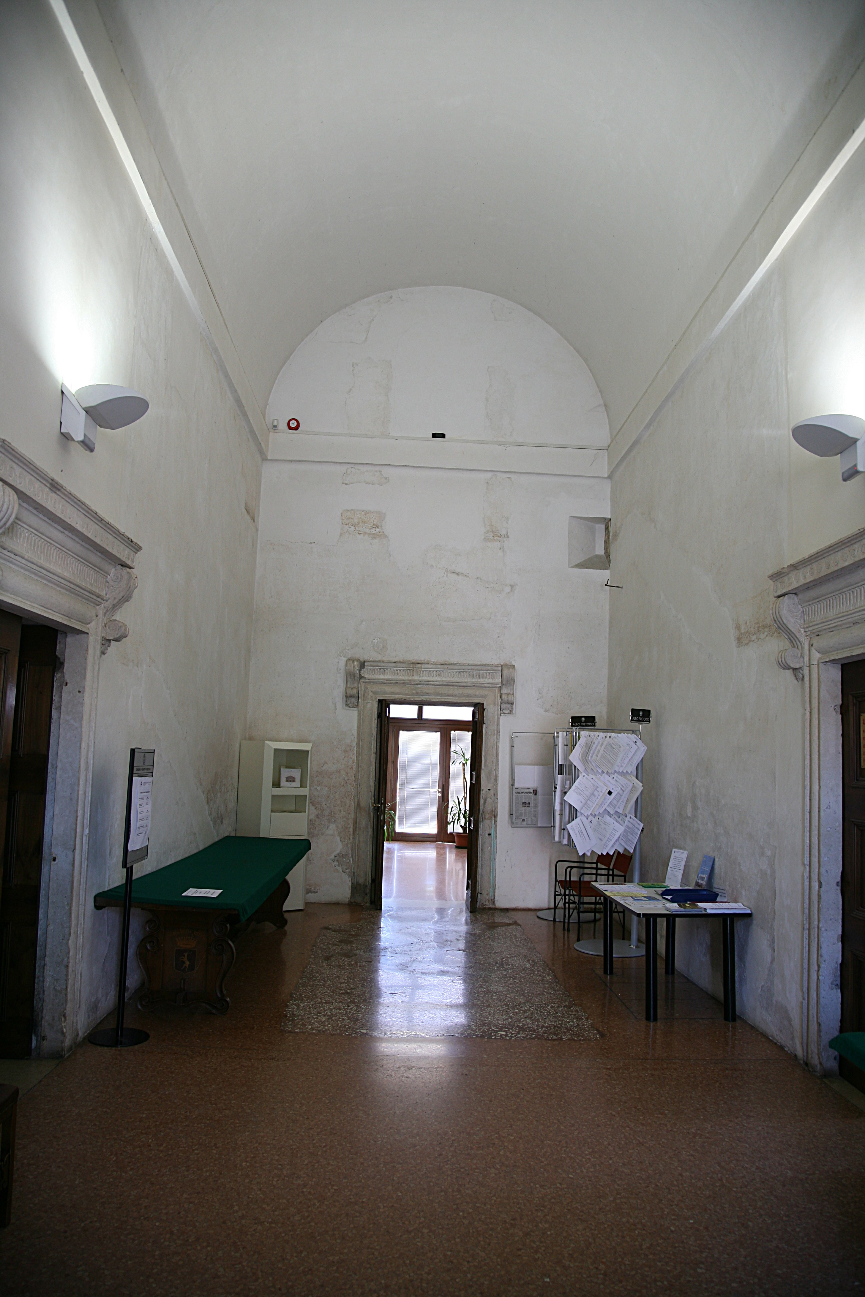 Villa Thiene at Quinto Vicentino by Andrea Palladio.